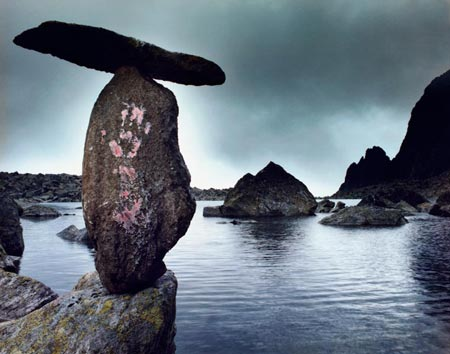 Jan Pohribný, fotografické dílo